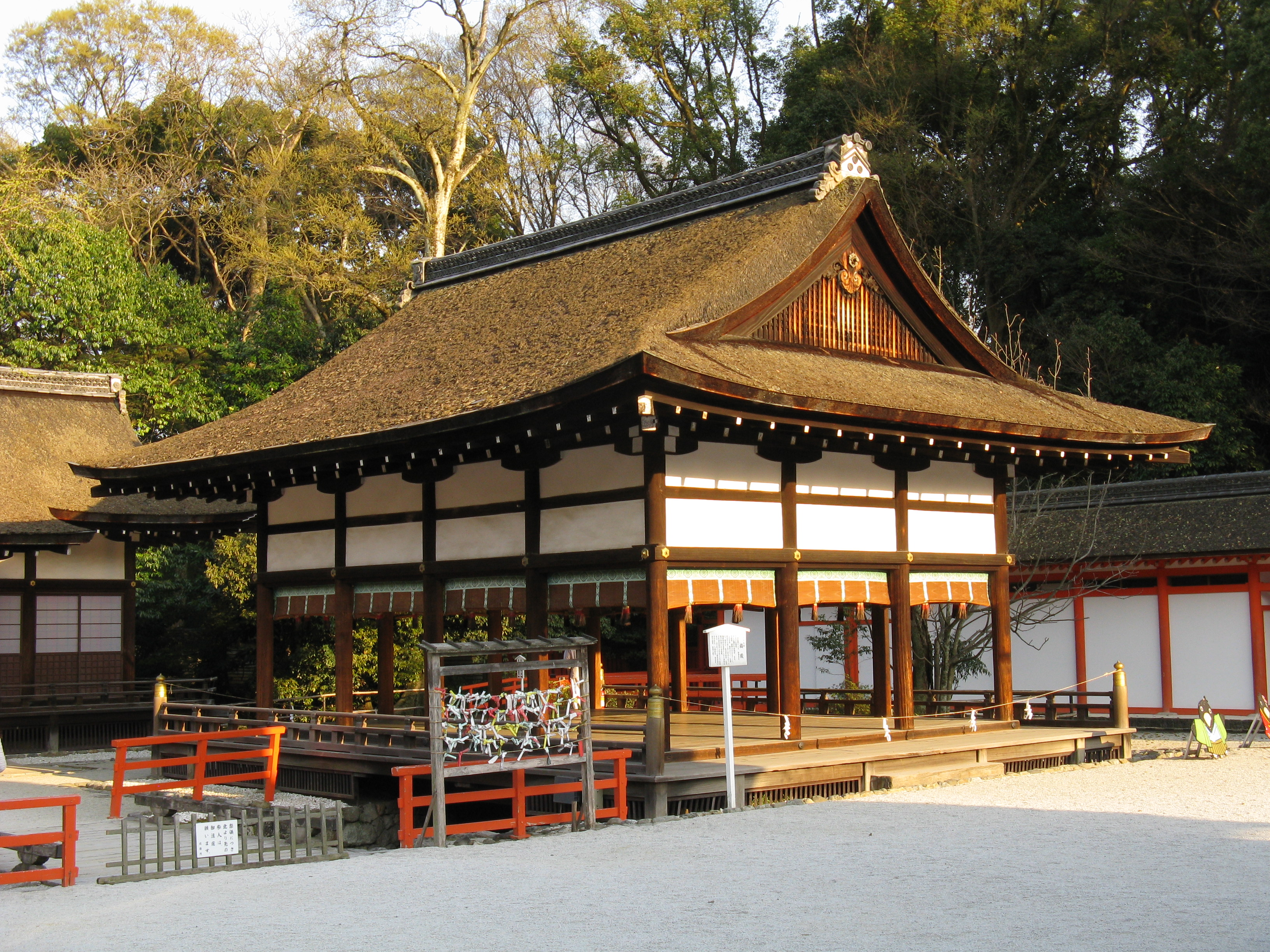 賀茂御祖神社（下鴨神社） 橋殿